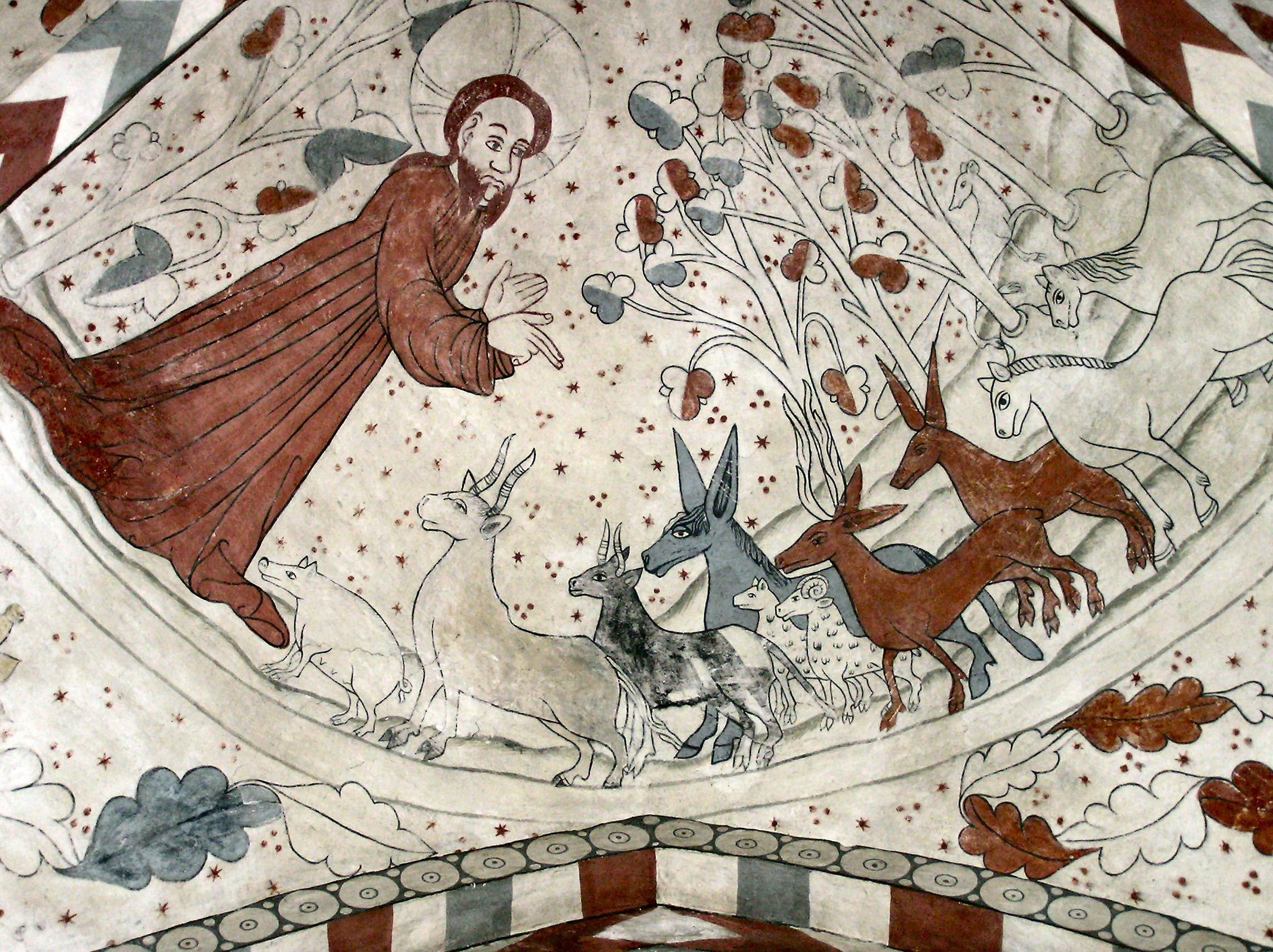 Vittskövle Kirke, Skåne, Skabelsesberetningen: dyrene på landjorden (1. Mos. 1,24)